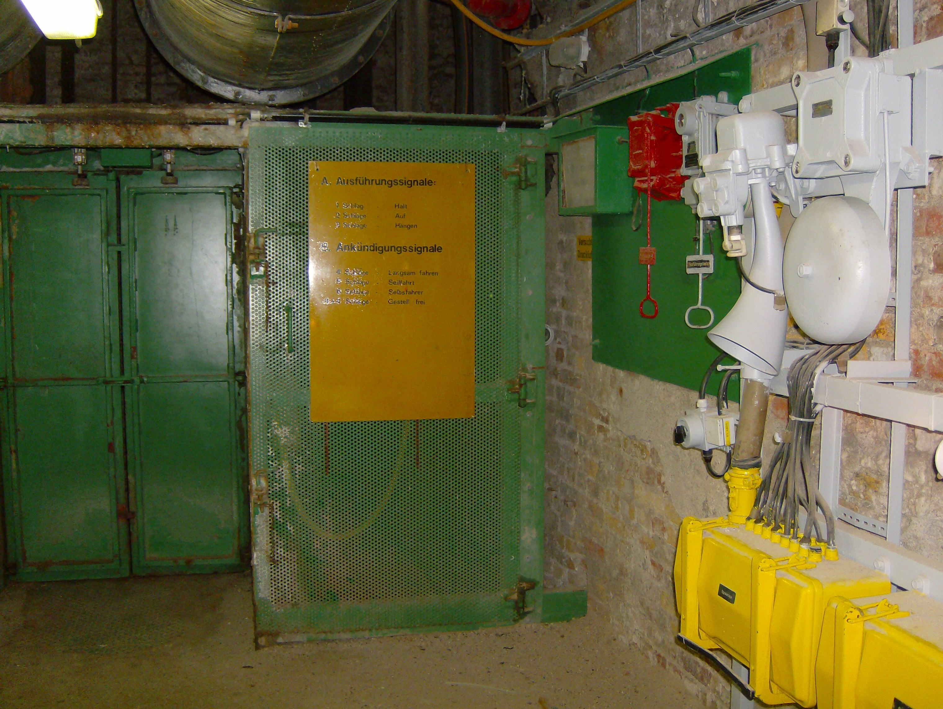 Füllort im Kali- und Steinsalzwerk Bartensleben in etwa 375 Meter Teufe